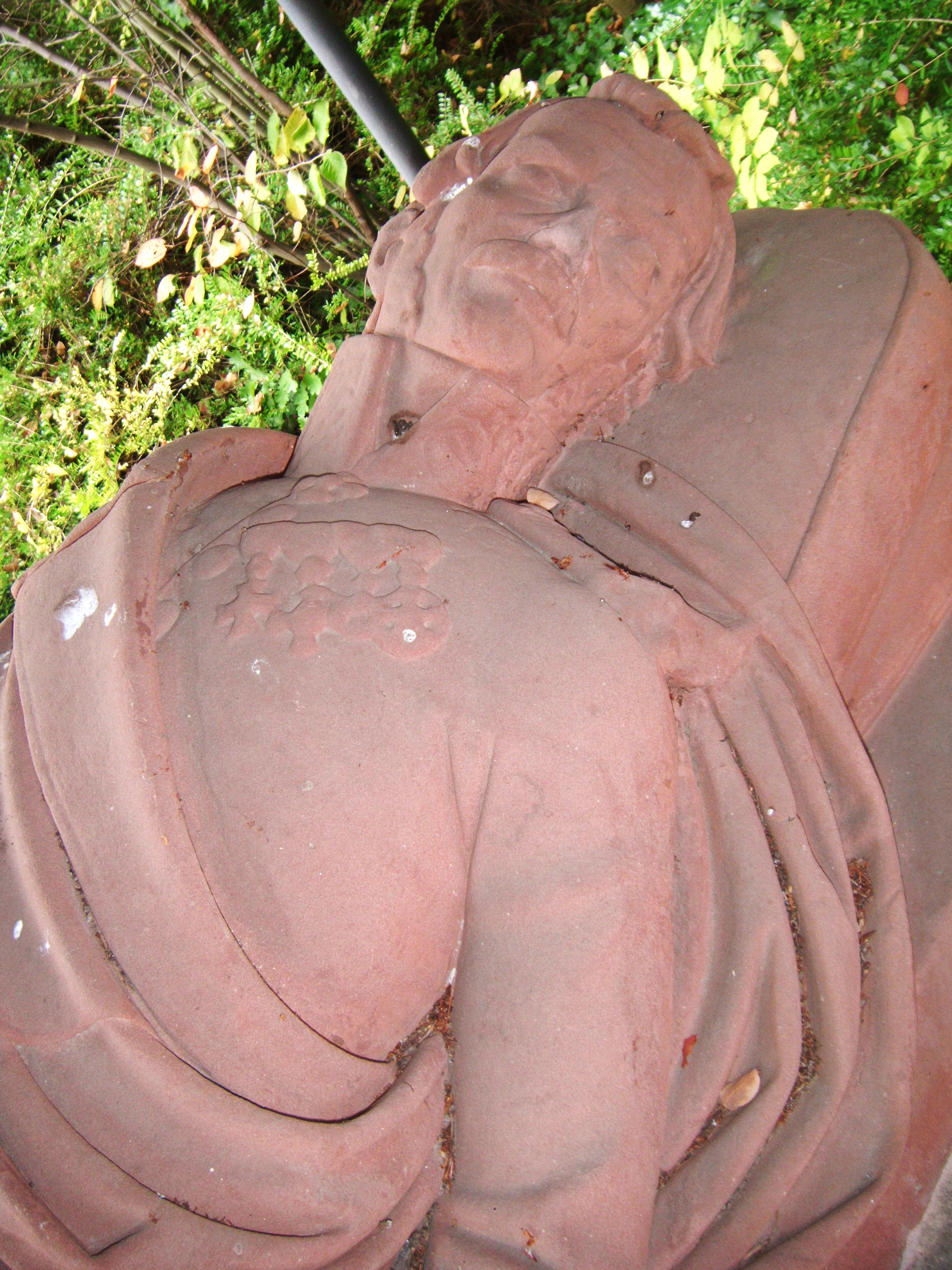 Georg von Mölter (1775-1846) bayerischer Generalmajor und Kommandant der Festung Landau (Pfalz), Grabmal, Friedhof Landau